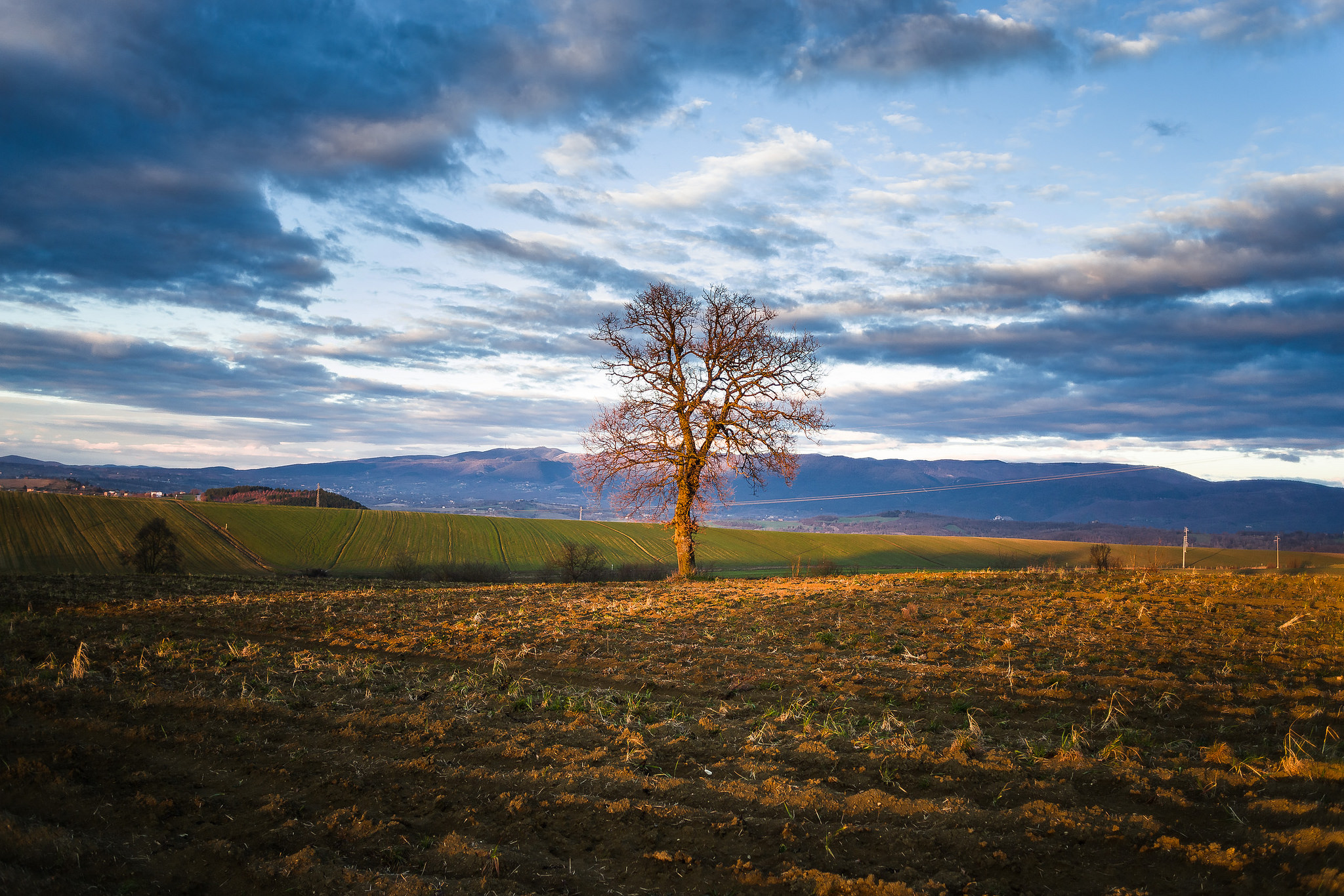 Tipica quercia camporile immersa fra i monti nella verdeggiante Val Ternana, poco fuori la città.